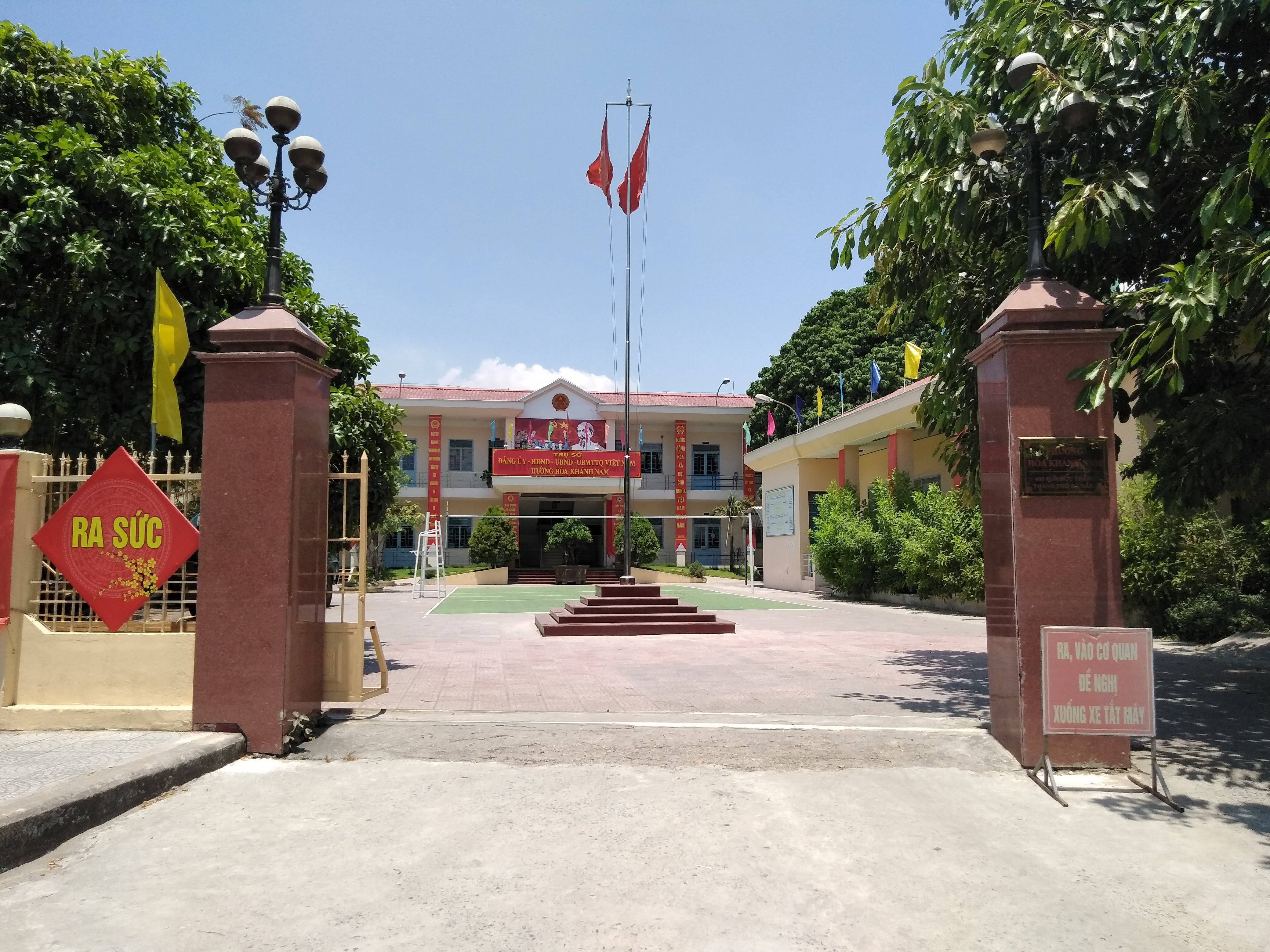 UBND phường Hòa Khánh Nam, Liên Chiểu, Đà Nẵng